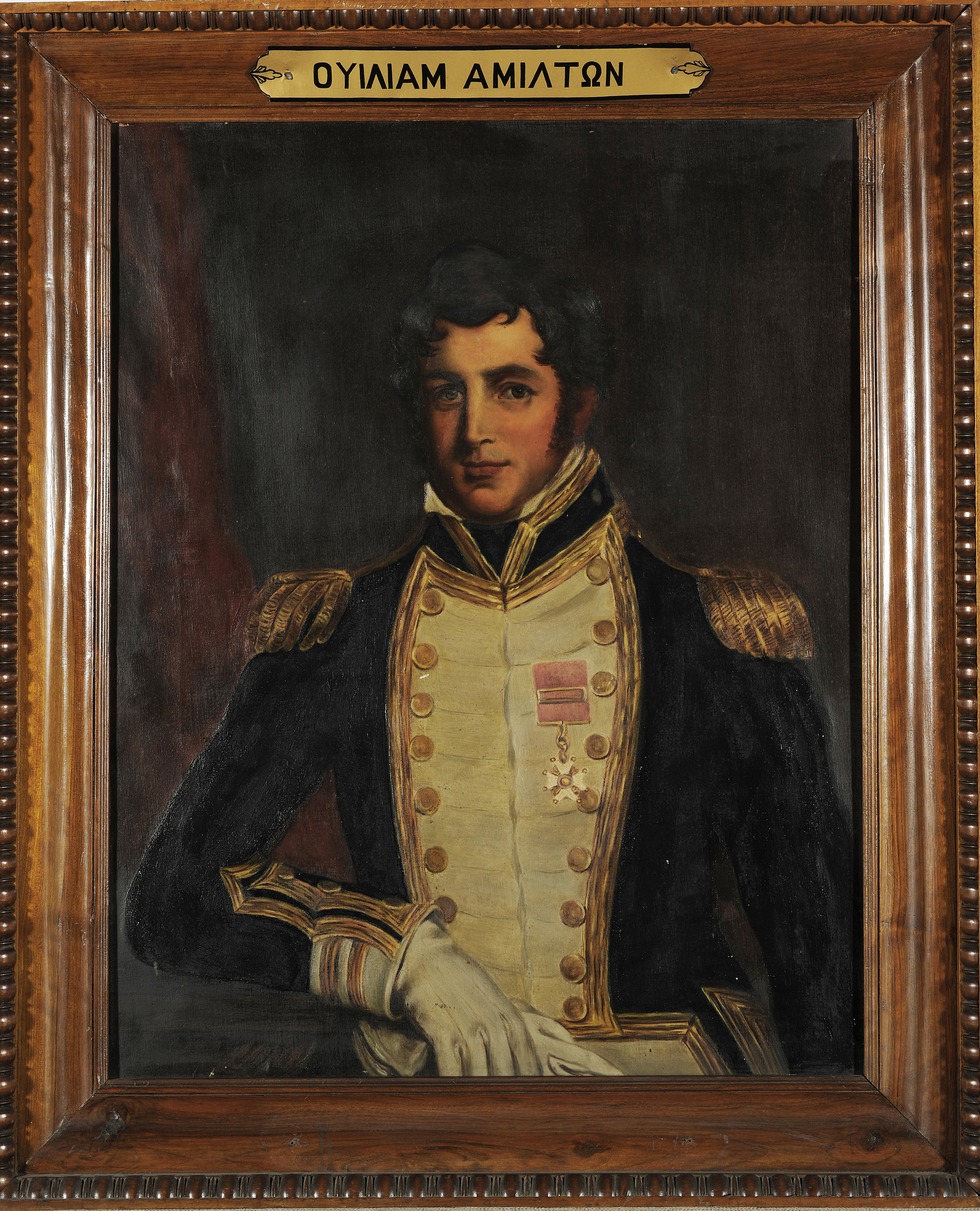 William Hamilton, έργο αγνώστου, ελαιογραφία σε μουσαμά, 84 X 66 εκ. (748) Εθνικό Ιστορικό Μουσείο.